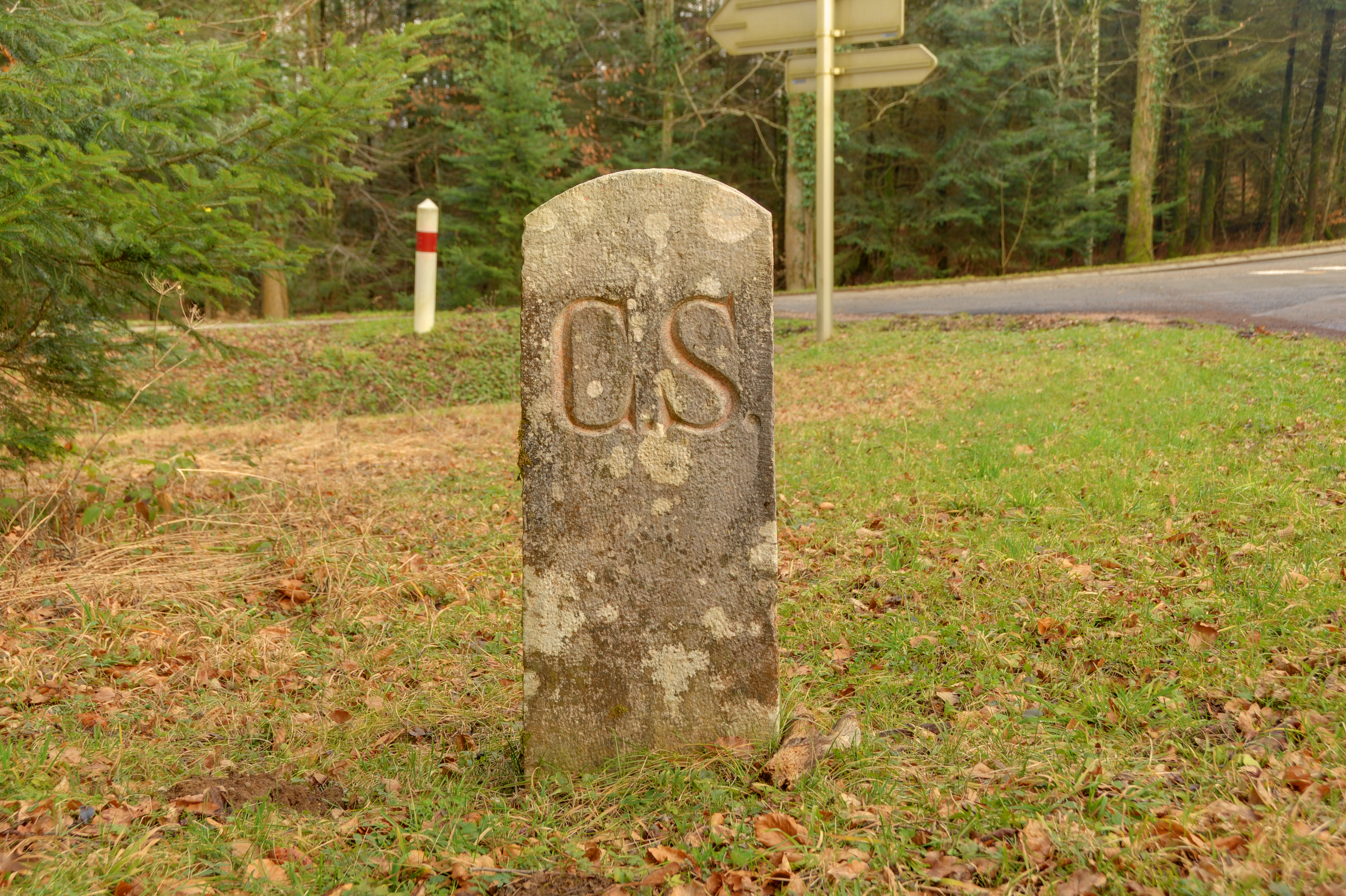 This photograph was taken with a Nikon D300 Détail d'une des bornes frontière franco-suisse (n°96A) vue côté suisse (HDR).